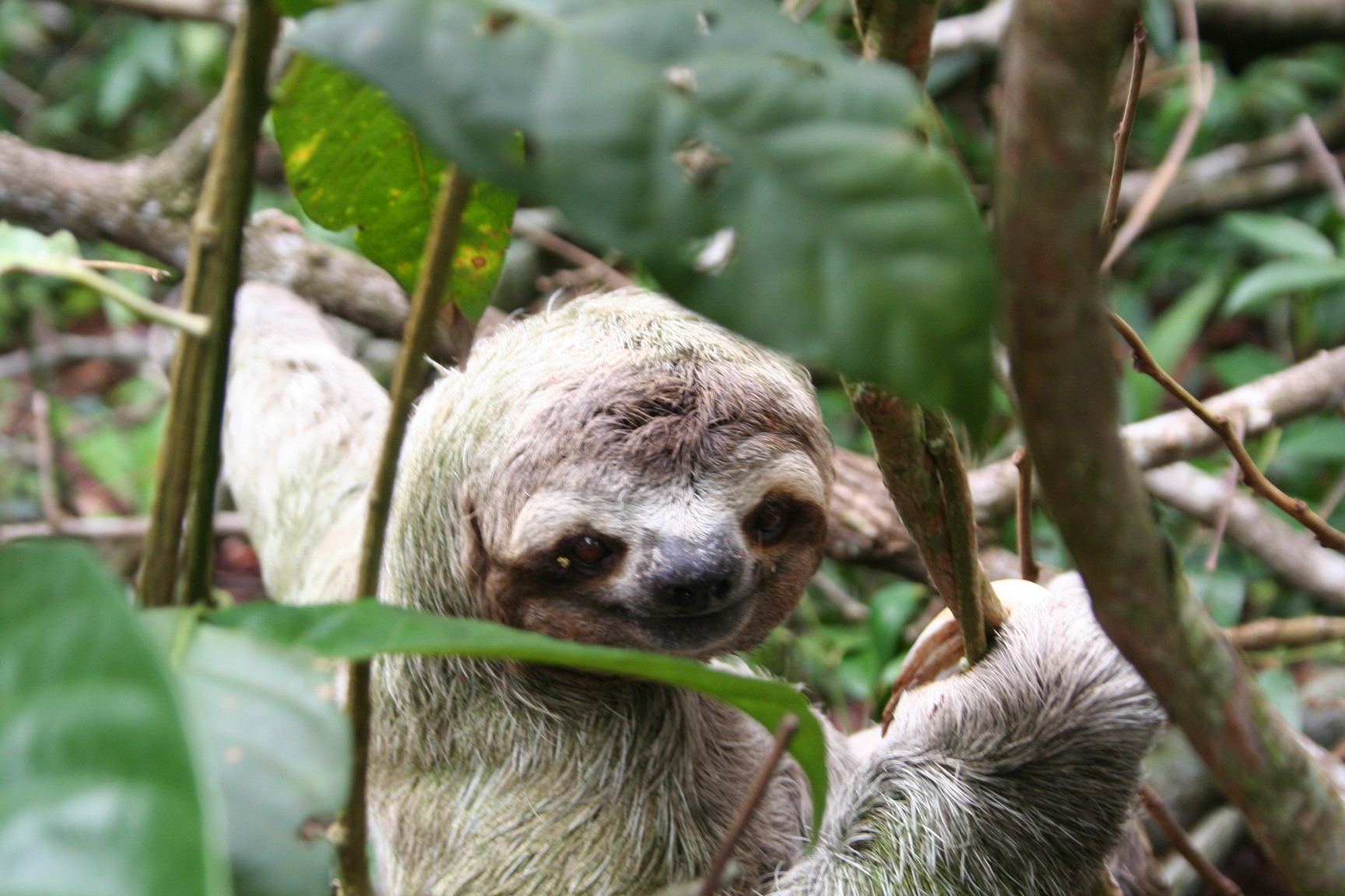 Faultier